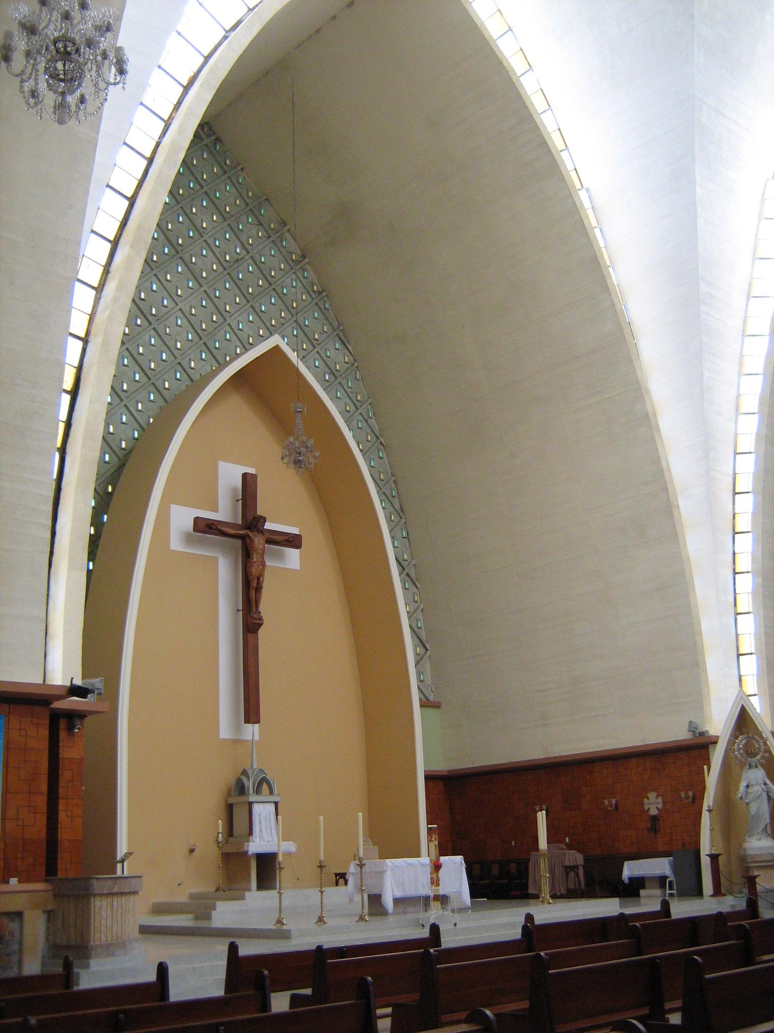 Basílica Menor de Nuestra Señora de las Misericordias en el Municipio de Santa Rosa de Osos, Antioquia. Colombia.